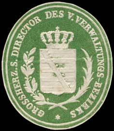 Sealing stamp Title: Gr. S. Director des V. Verwaltungs-Bezirks Description: grün, weiß, geprägt Place: Weimar size: 4x3 cm